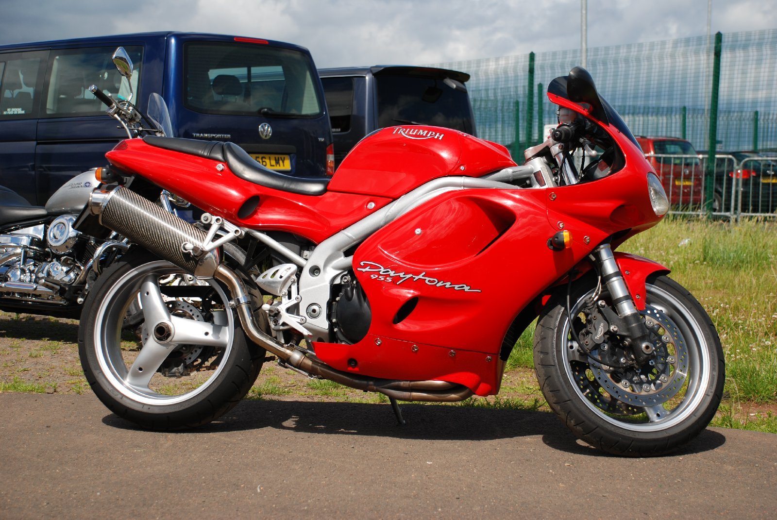 Triumph Daytona 955i (1999)